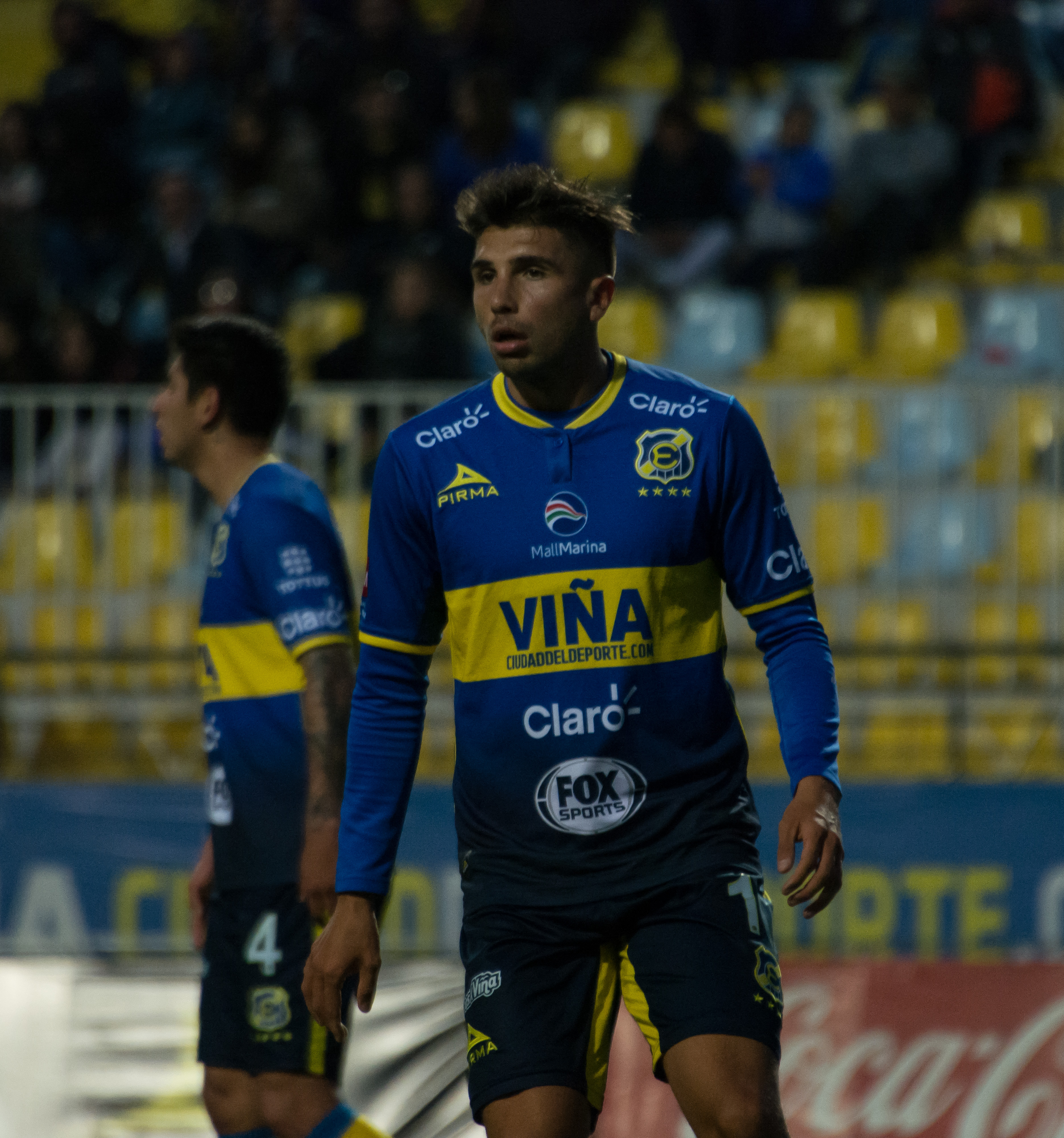 Everton v Unión Española, Estadio Sausalito, Viña del Mar, Chile.